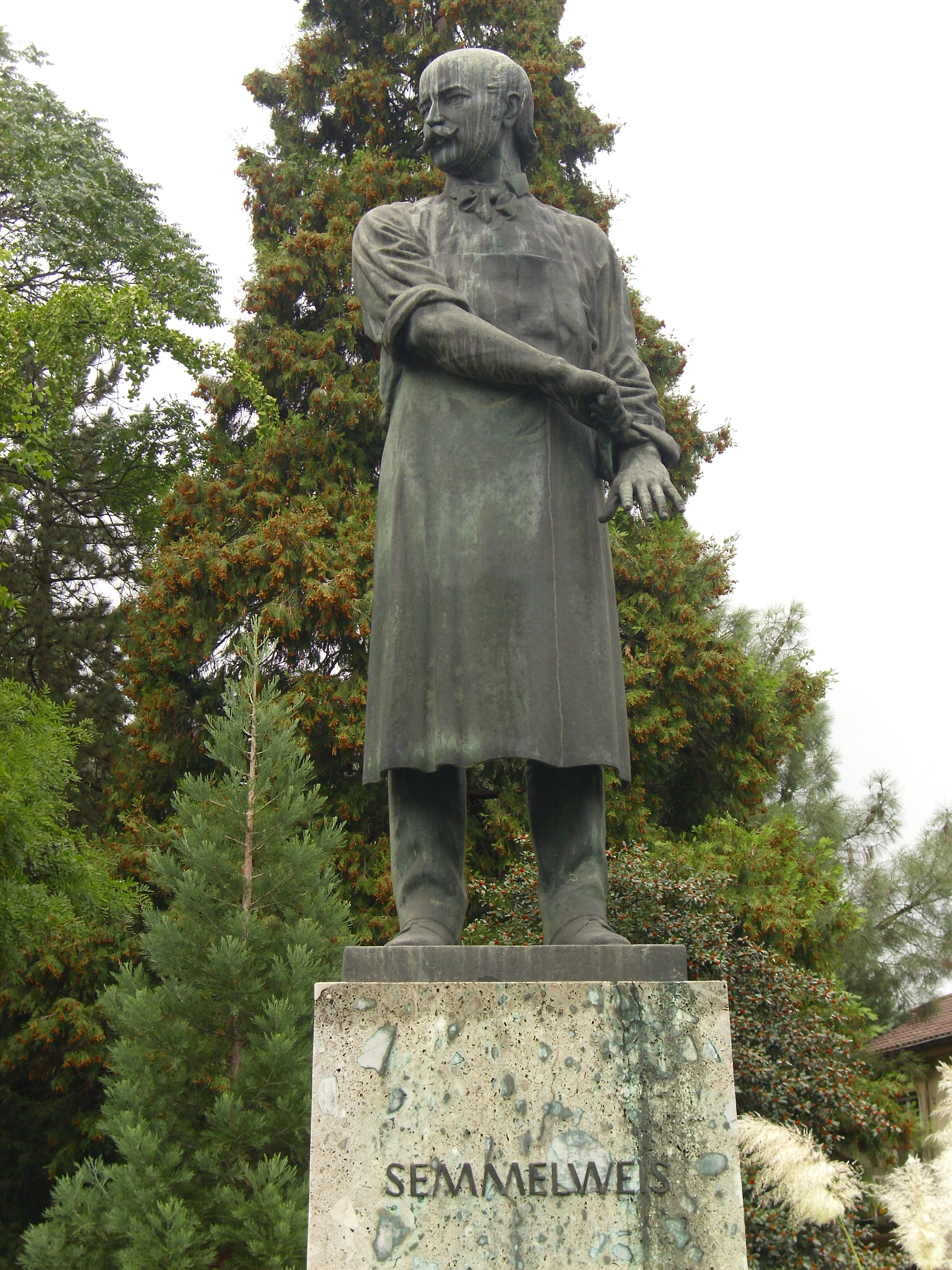 Das Denkmal von Herrn Ignaz Philipp Semmelweis steht auf dem Gelände der Universität Heidelberg, am Eingang zum Botanischen Garten (Bild 011). Es steht „Im Neuenheimer Feld“ (=Straßenname) zwischen dem Gebäude 340 (= Botanischer Garten) und dem Gebäude 360. Die Statue sieht mit dem Gesicht zu den Gebäuden der alten Kinderklinik auf der gegenüberligenden Straßenseite (Bild 006). Fotografie von Christa Rechel. Bildhauer Friedrich Müller 1971